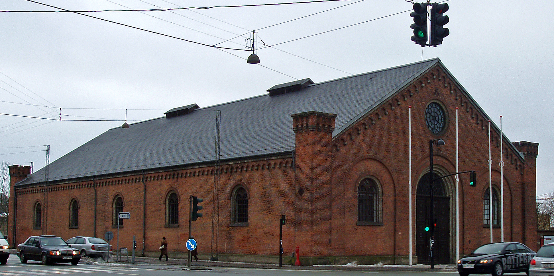 Ridehuset i Århus